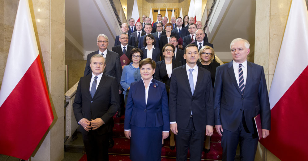 Pierwszy dzień rządu Beaty Szydło.